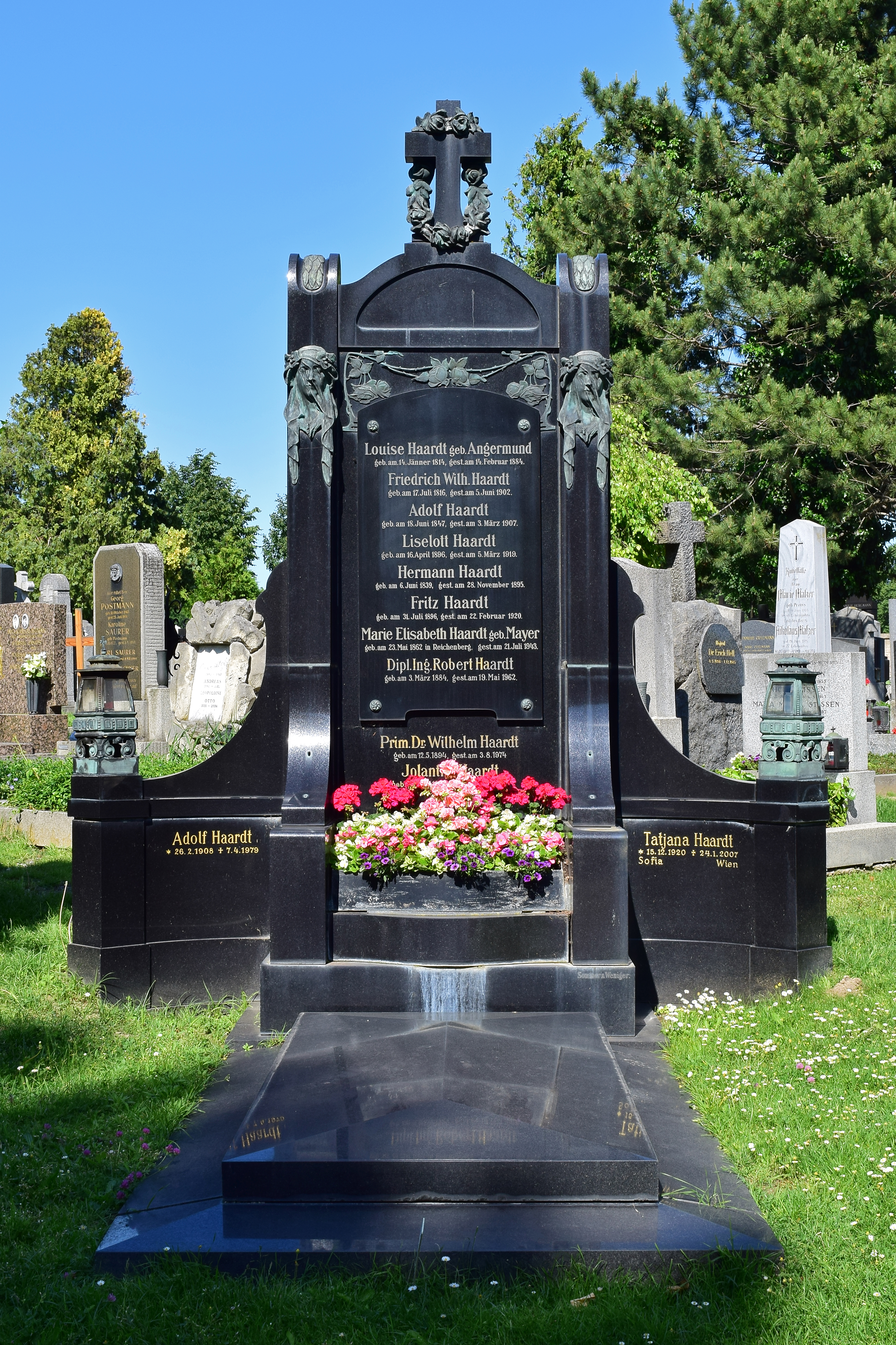 Ehrenhalber gewidmetes Grab von Wilhelm und Robert Haardt auf dem evangelischen Friedhof im Wiener Zentralfriedhof